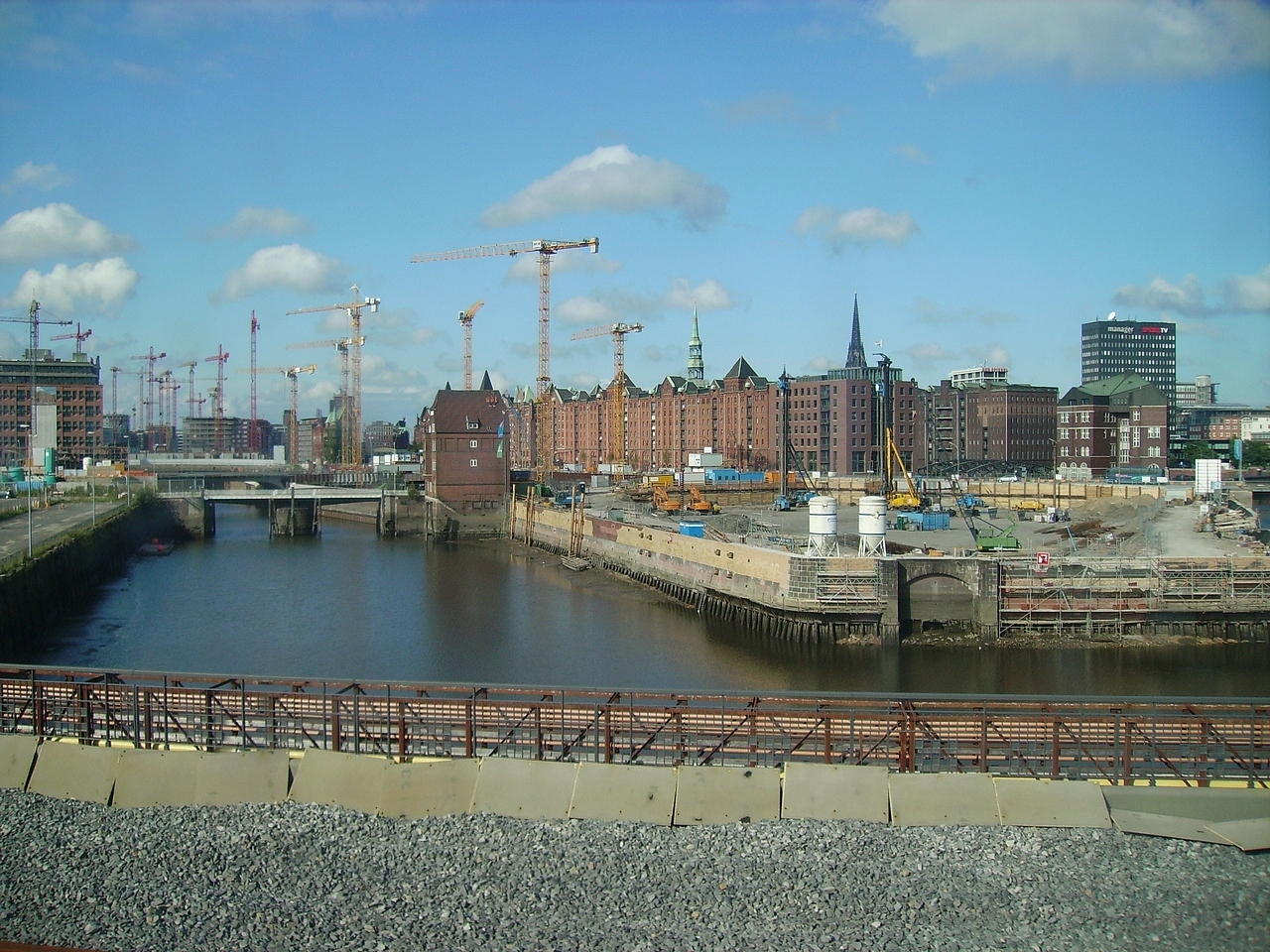 Blick von einem nach Hamburg Hauptbahnhof fahrenden Zug auf die Innenstadt (Das Bild entstand vermutlich bei Passieren der Oberhafenbrücke und zeigt die Ericusspitze [rechts] und die Ericusbrücke mit dem Zollamt Teerhof)